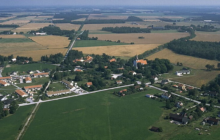 Motiv: Väskinde kyrka Nyckelord: Flygbilder, Riksintressen Kategori: KyrkbyVäskinde kyrka